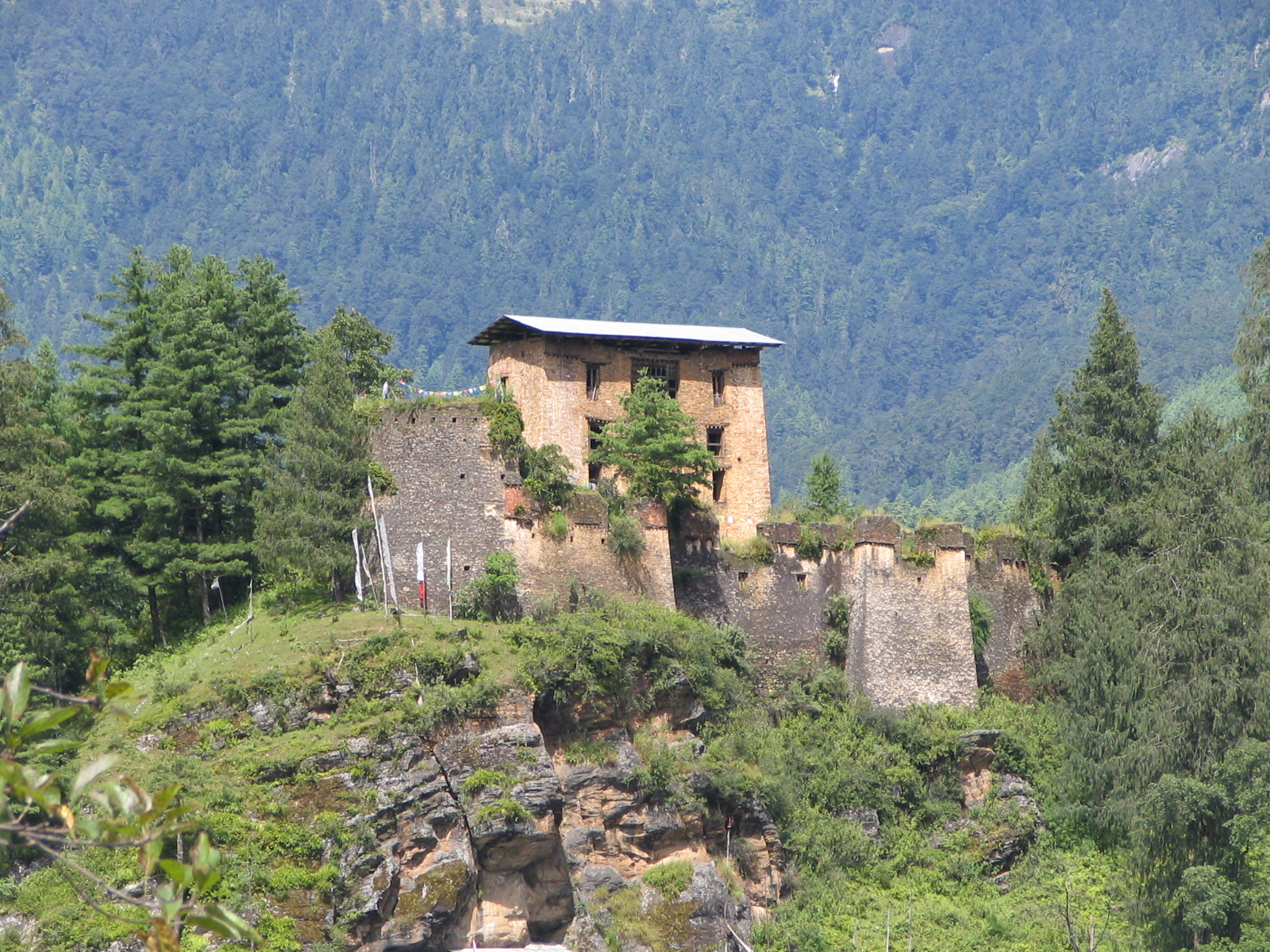 Drukgyel Dzong, Bhutan. Douglas J. McLaughlin, 5 September 2006